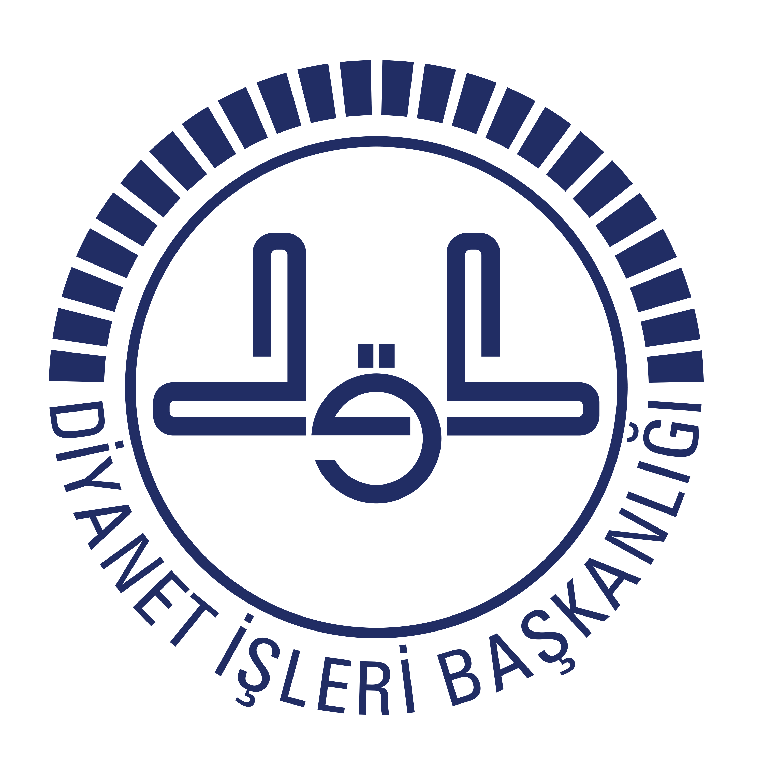 Türkiye Cumhuriyeti Diyanet İşleri Başkanlığı Yüksek Çözünürlüklü Amblemi